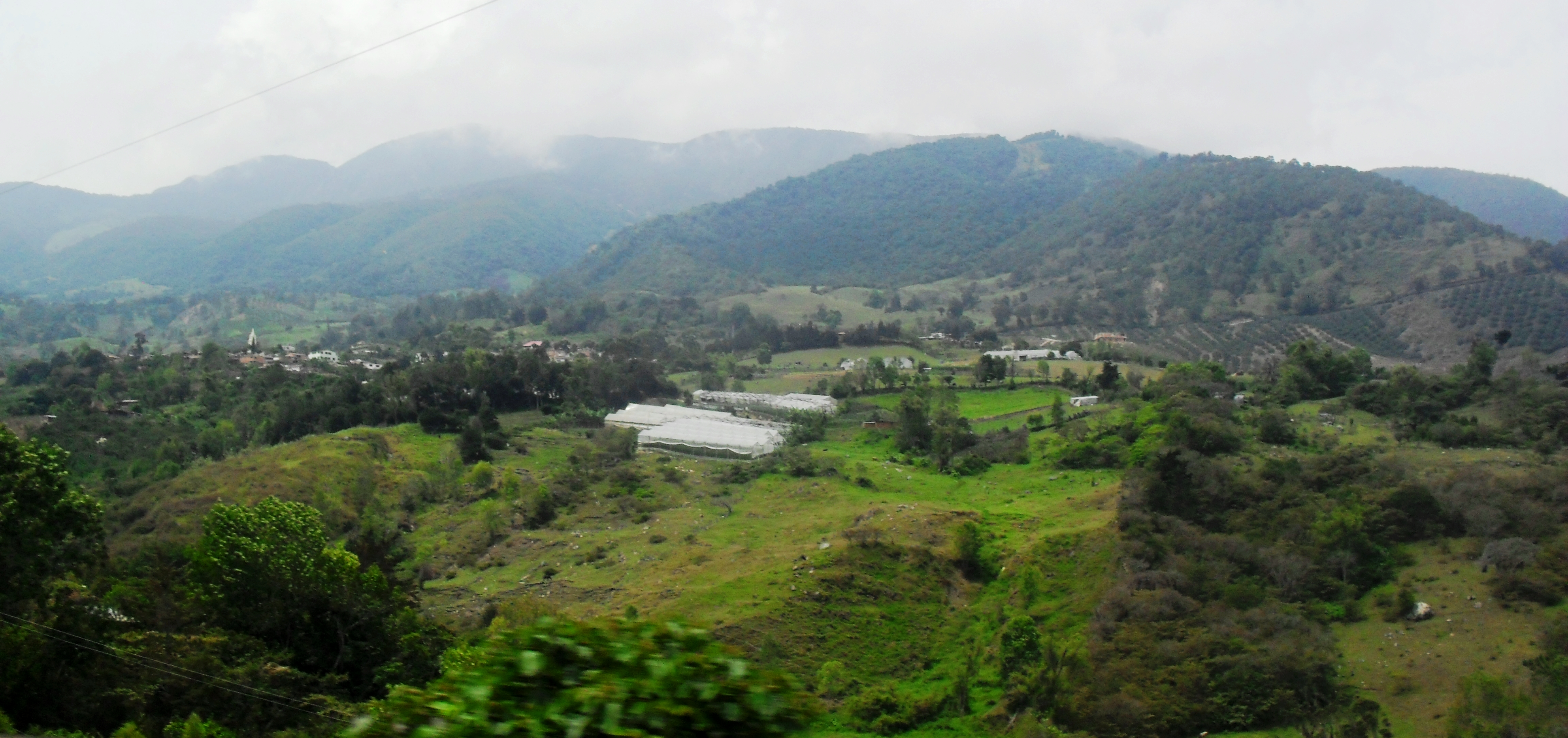 Pamplonita,N.S. desde la vía Cúcuta-Pamplona.